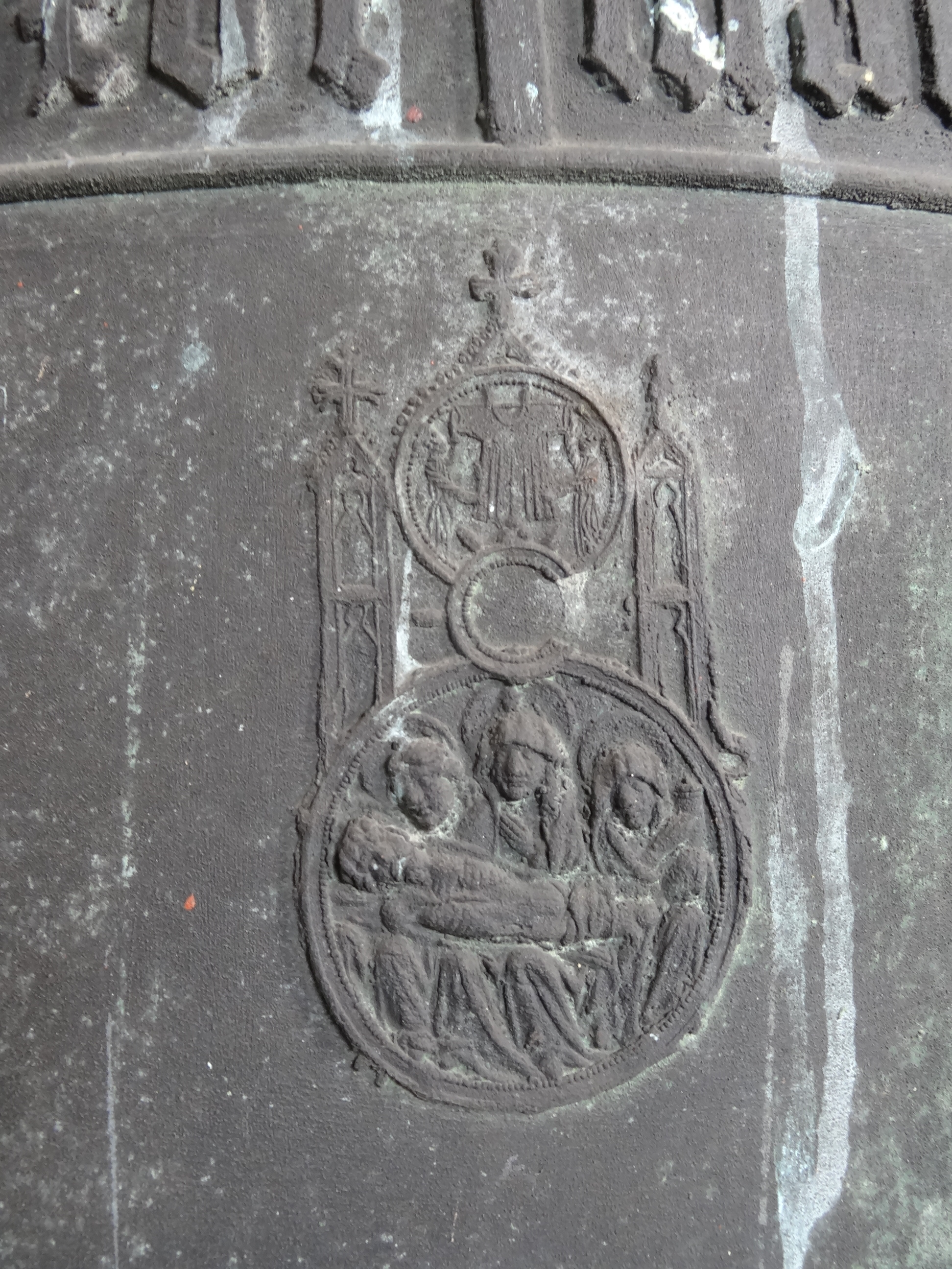 St. Peter (Großen-Linden); Aachener Spiegelzeichen von der Heiligtumsfahrt 2. Hälfte 15. Jahrhundert; Die Glocke wurde von Tilman von Hachenburg 1476 gegosssen.